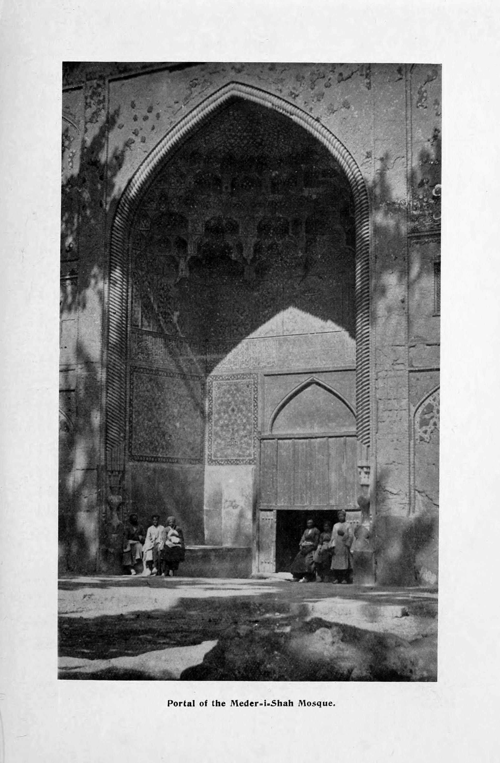 مسجد مادر شاه